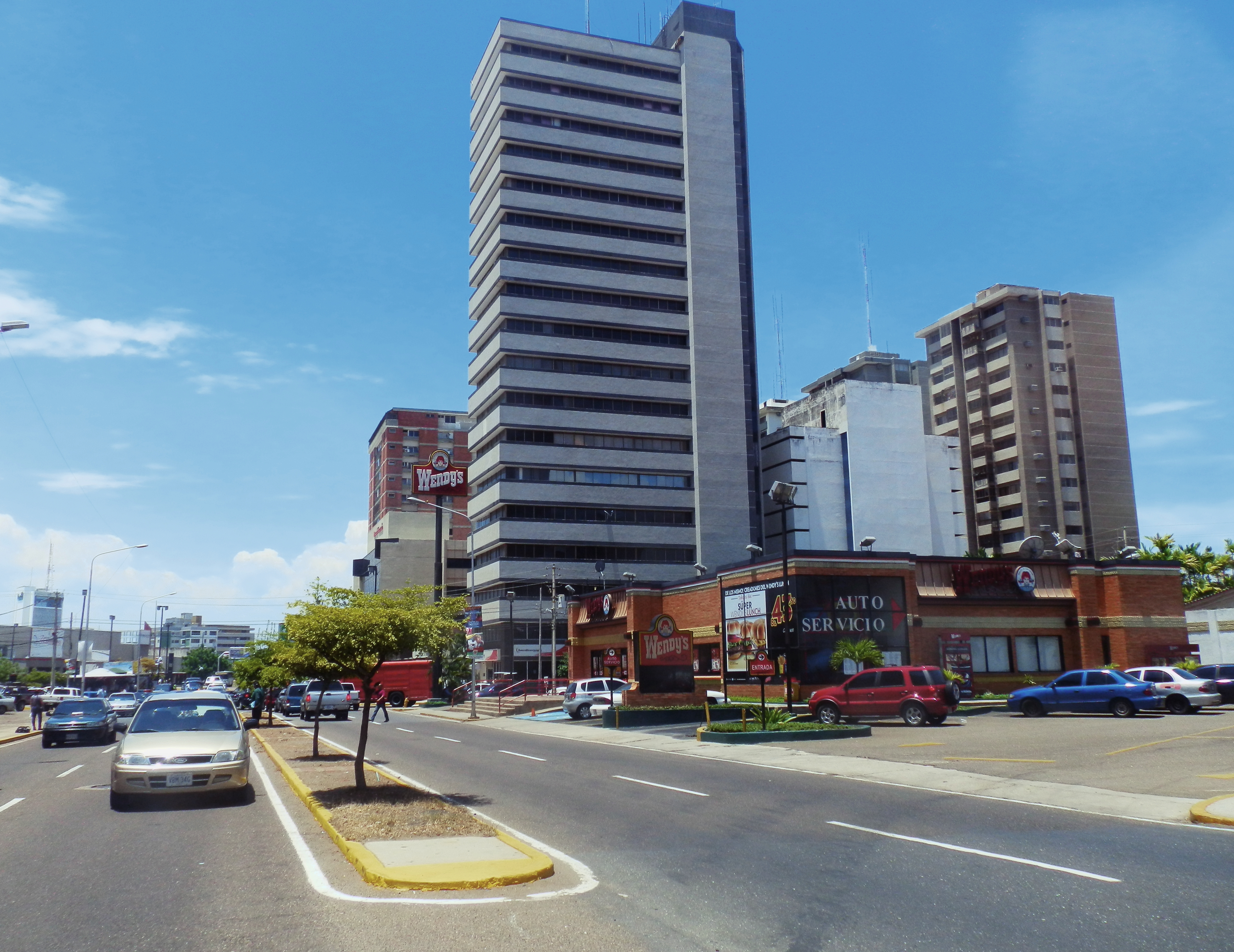 Edificios en la avenida 5 de Julio de Maracaibo, Venezuela